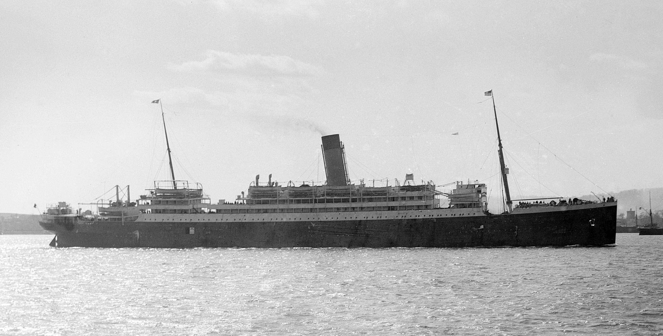 SS Megantic